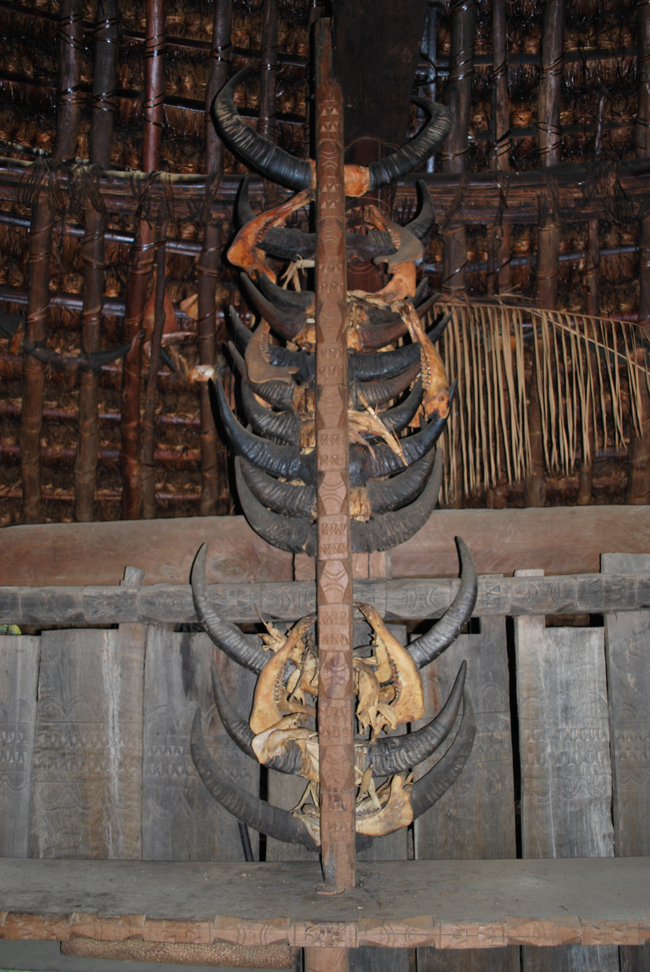 Uma Lulik in Fad Locar, Hautio, Suco Nuno-Mogue, Subdistrikt Hatu-Builico, Distrikt Ainaro